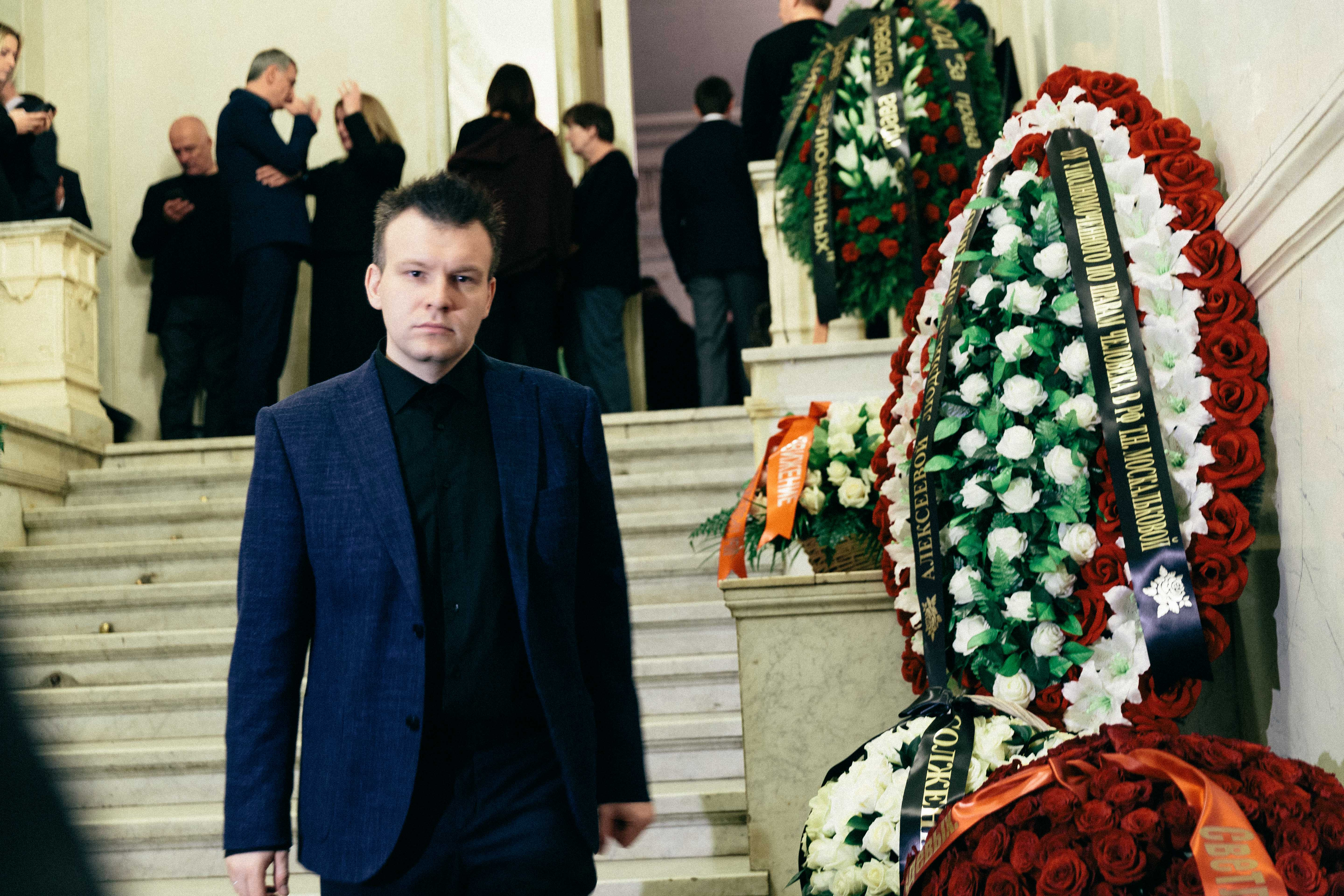 Николай Кавказский на прощании с Людмилой Алексеевой. 11 дек. 2018 г.